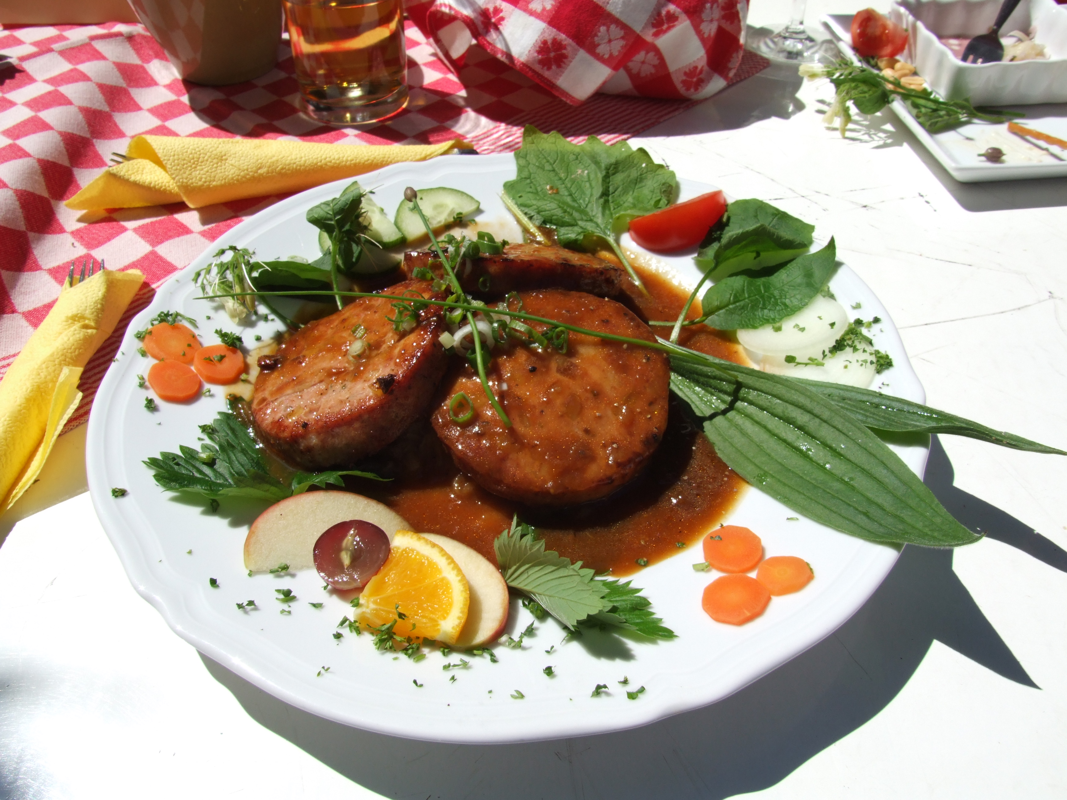 Saumagen mit Sauerkraut, ein typisches Gericht der Pfälzer Küche pf: Saumache mit Sauerkraut